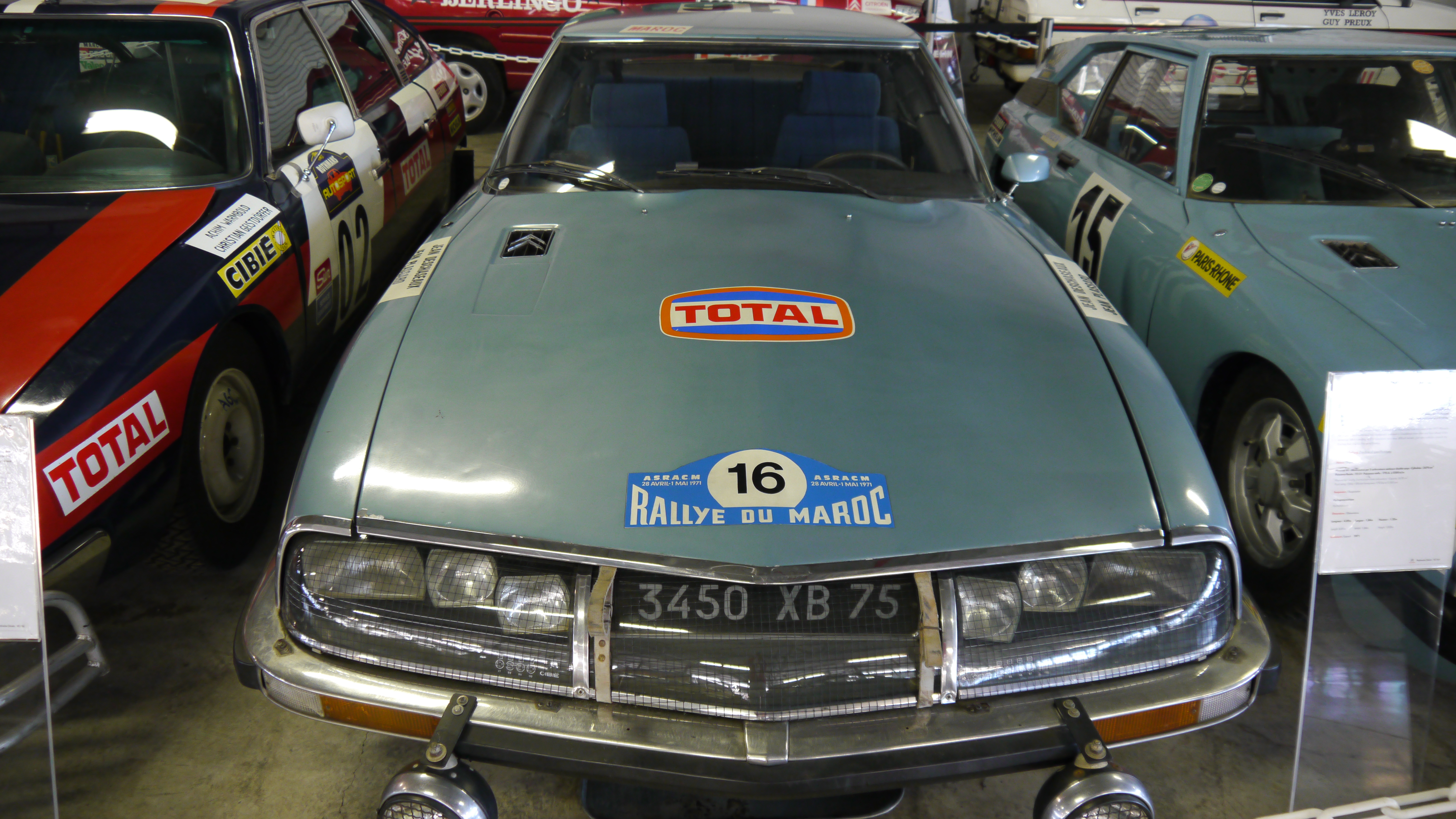 Conservatoire Citroen 147 Citroen SM Rallye